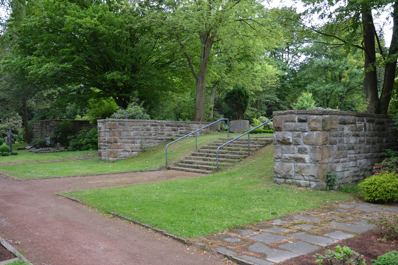 Reste des Gau-Ehrenmals der NSDAP auf dem Südwestfriedhof in Essen